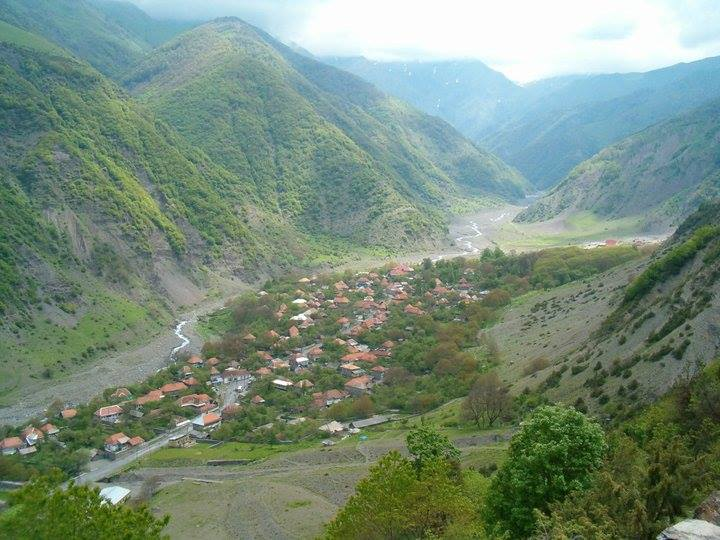 İlisuda məhəllə